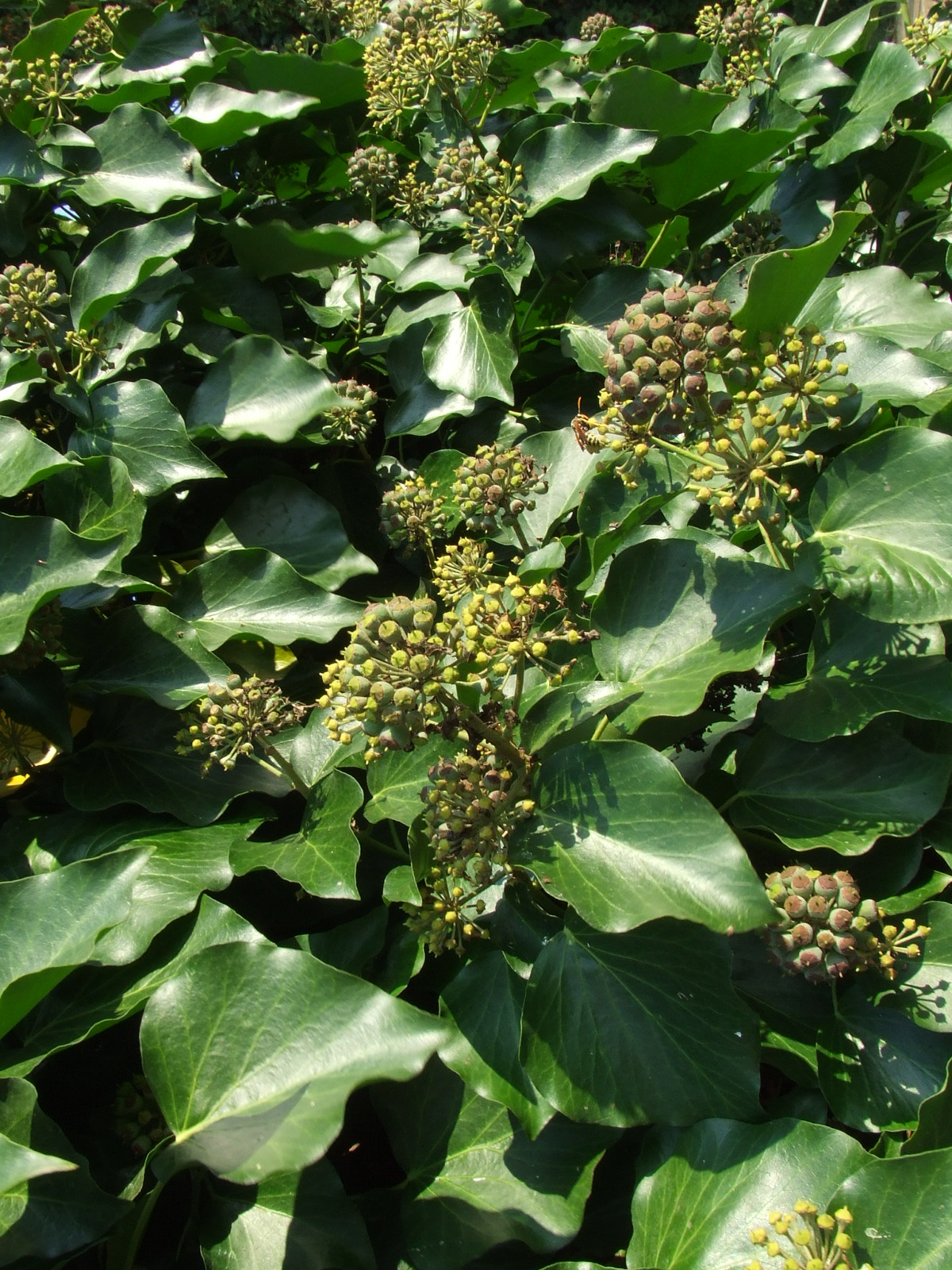 Hedera helix (közönséges borostyán) lombozata közelről